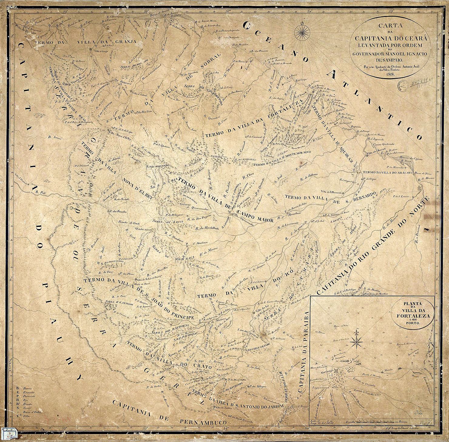 Carta da capitania do Ceará levantada por ordem do governador Manoel Ignácio de Sampaio